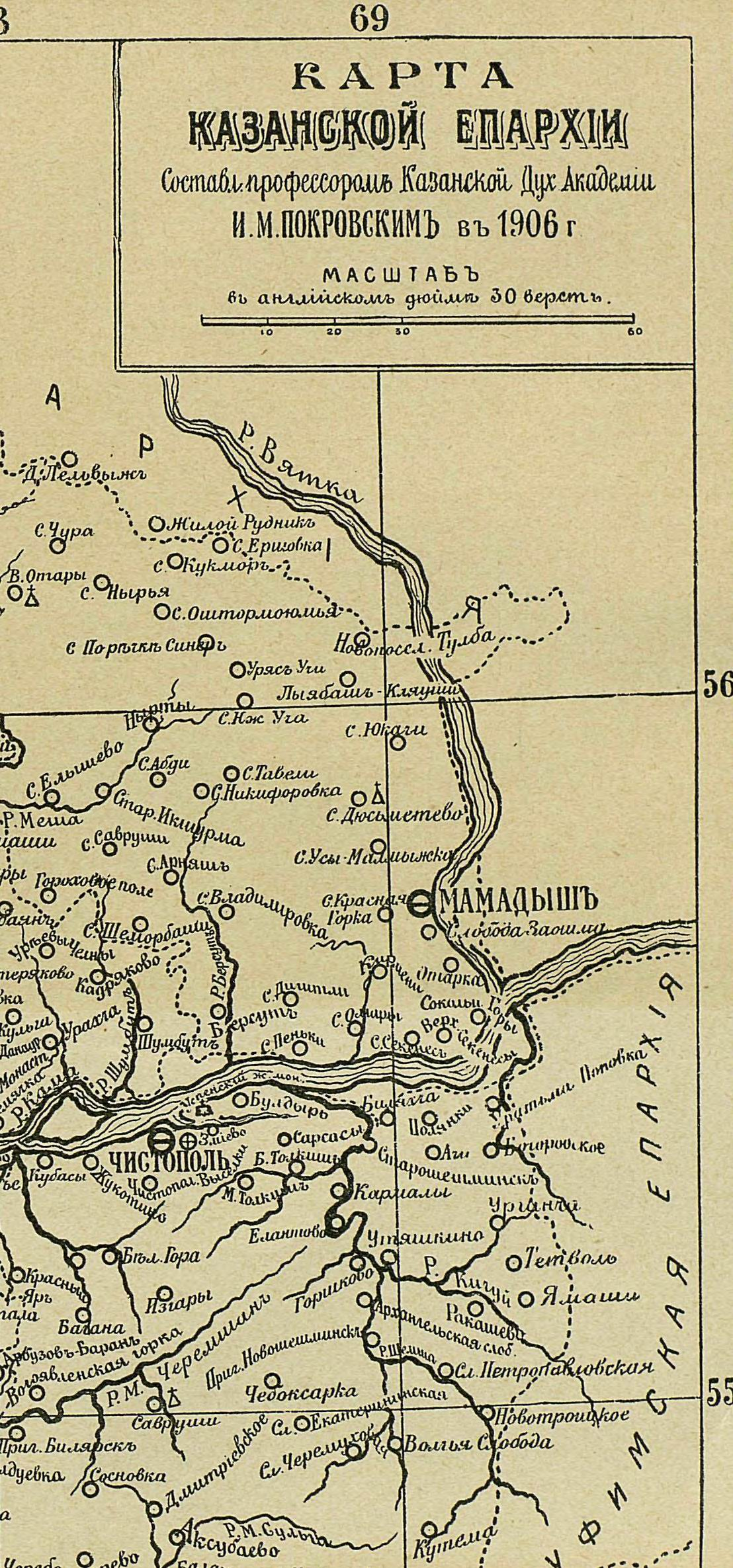 фрагмент карты